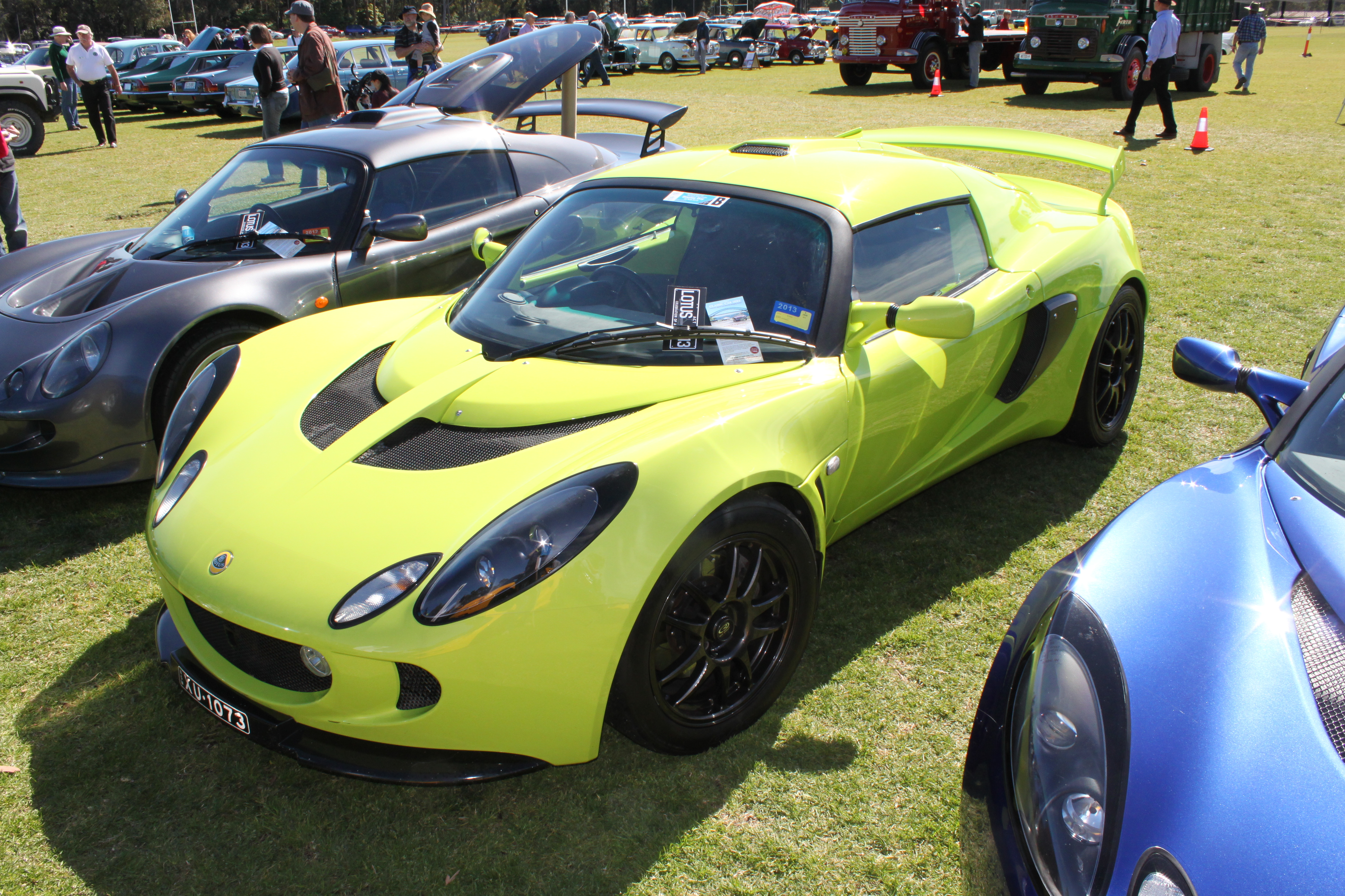 Lotus Elise